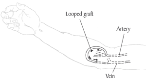 Hemodialysis graft. Used in hemodialysys